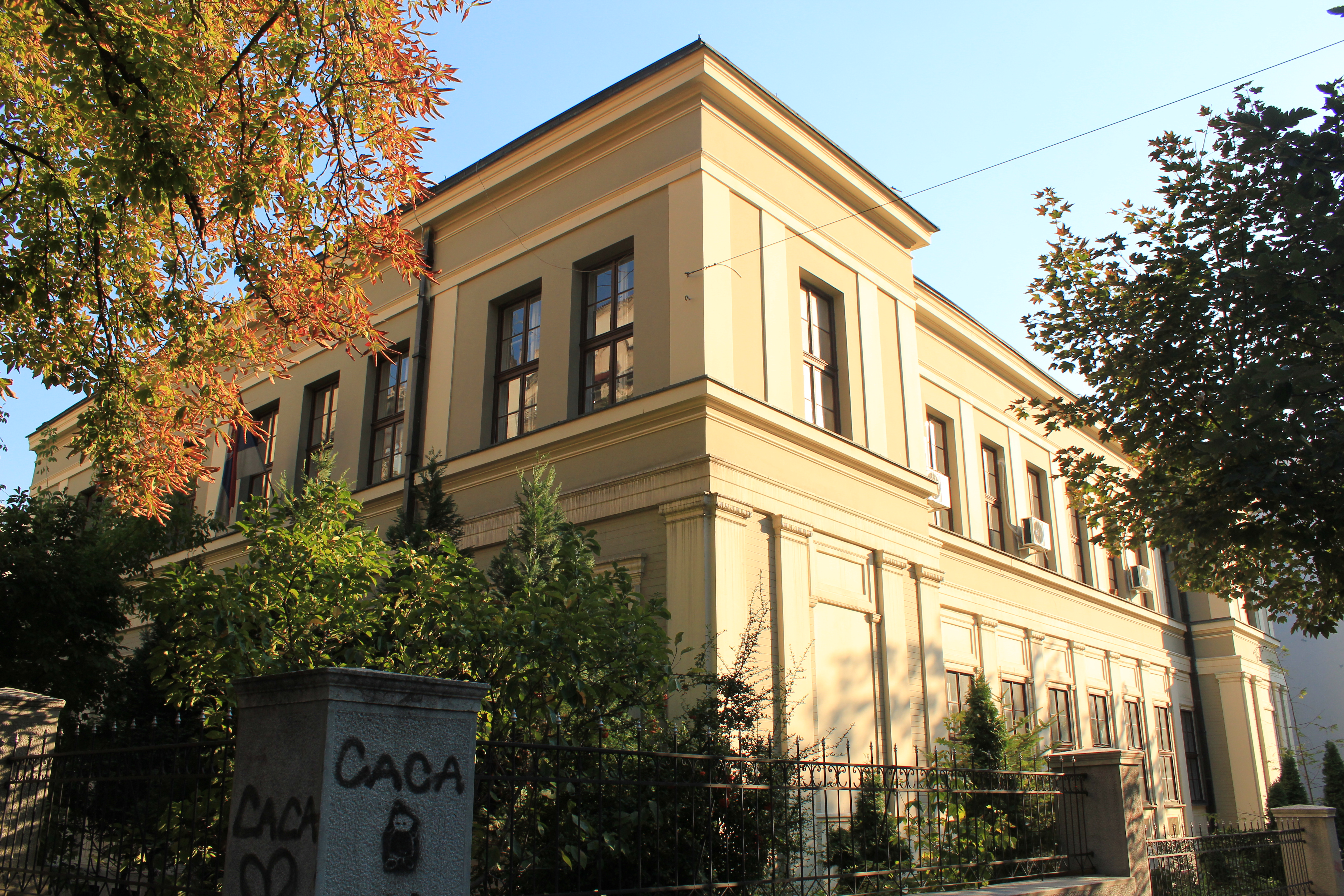 Državna hemijska laboratorija